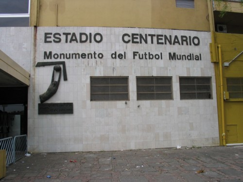 Estadio Centenario, Montevideo, Uruguay.